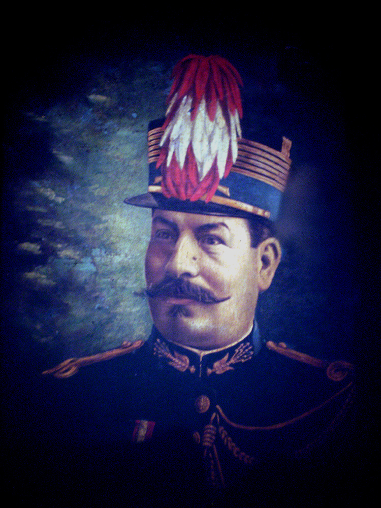 Fotografía de pintura familiar